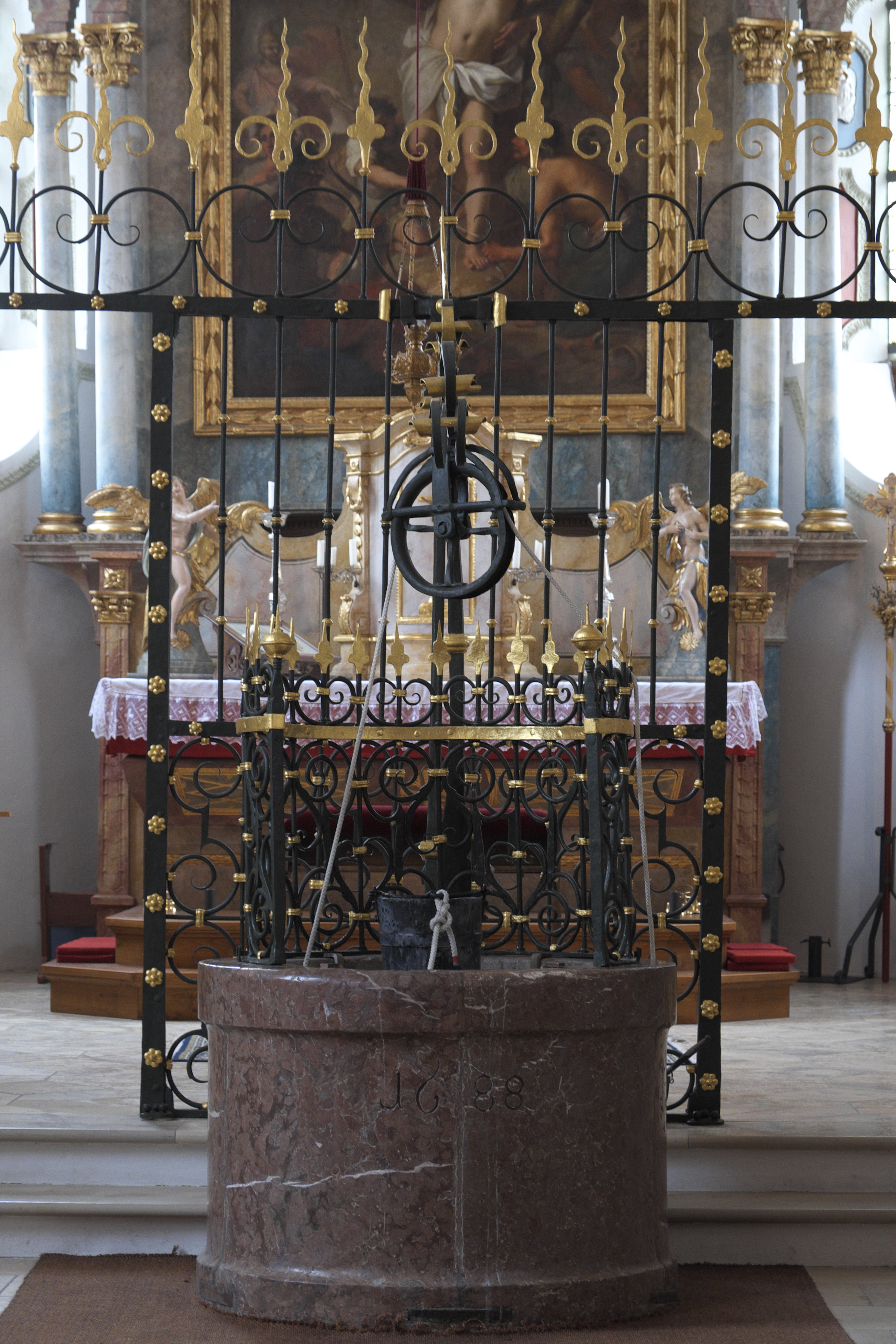 Katholische Wallfahrtskirche Heilig Blut in Einsbach, einem Ortsteil von Sulzemoos im Landkreis Dachau (Bayern/Deutschland), Ziehbrunnen, bezeichnet 1688